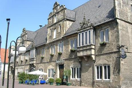 Altes stadthäger Rathaus